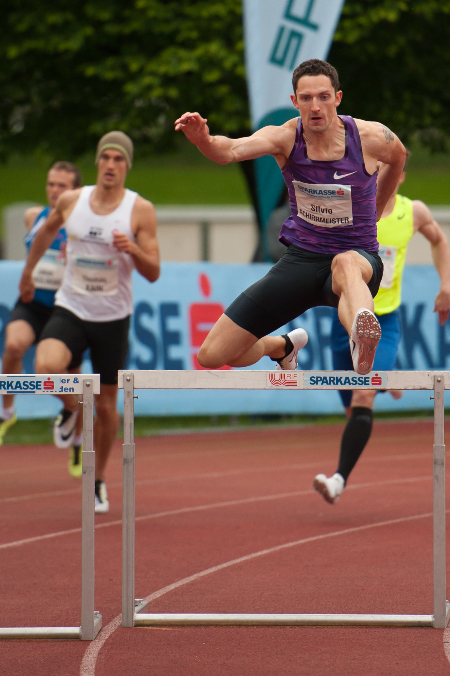 Salzburger Leichtathletik Gala am 27. Mai 2015: Silvio Schirrmeister